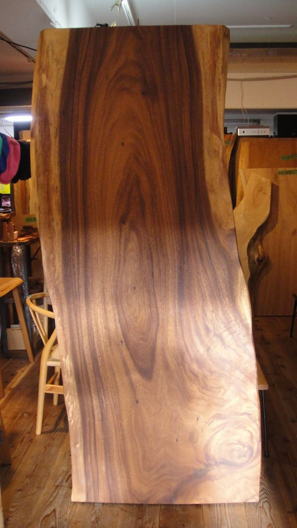 モンキーポットの一枚板。芯はダークブラウンで、木目が美しい。